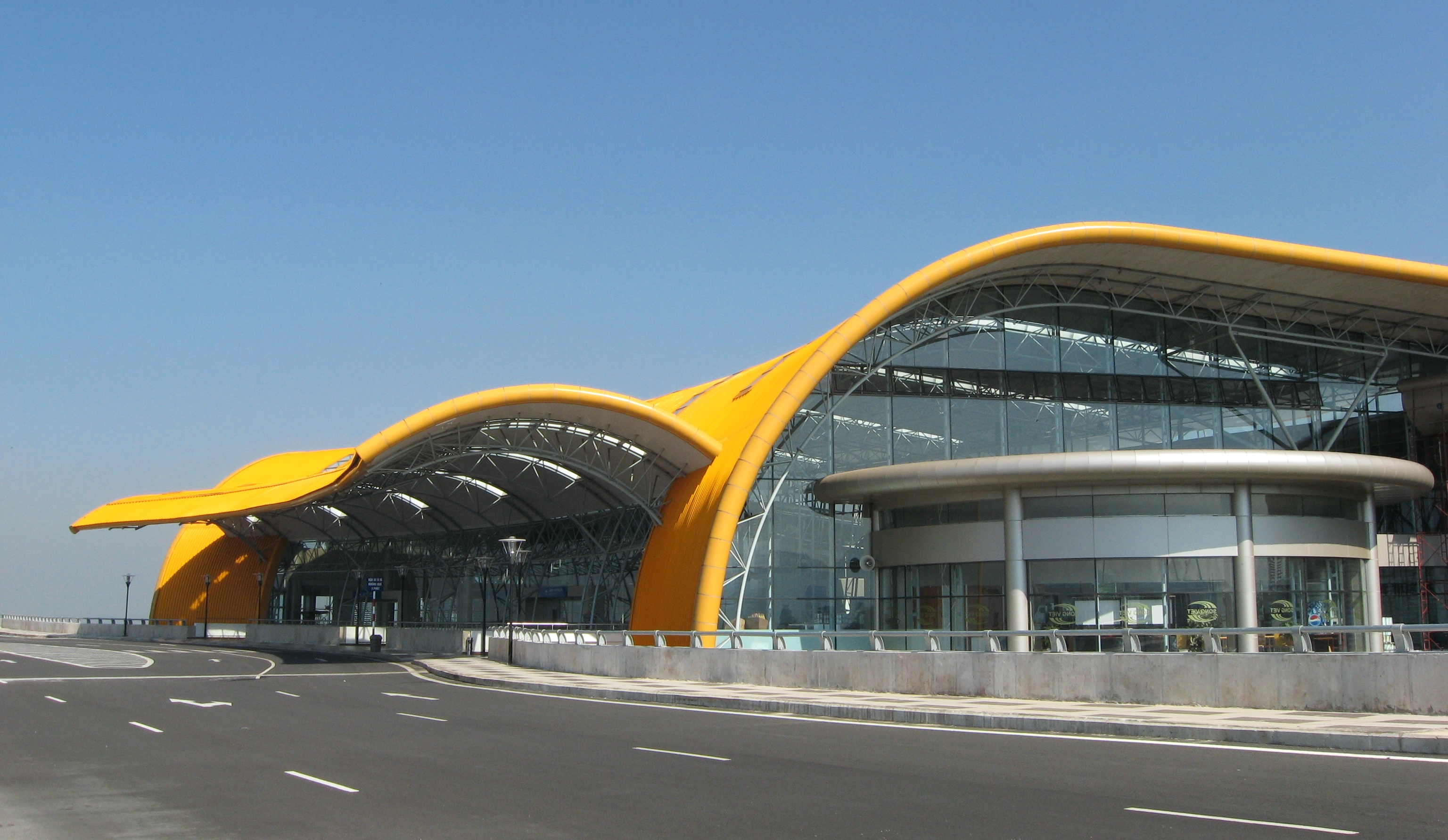 Lien Khuong Airport